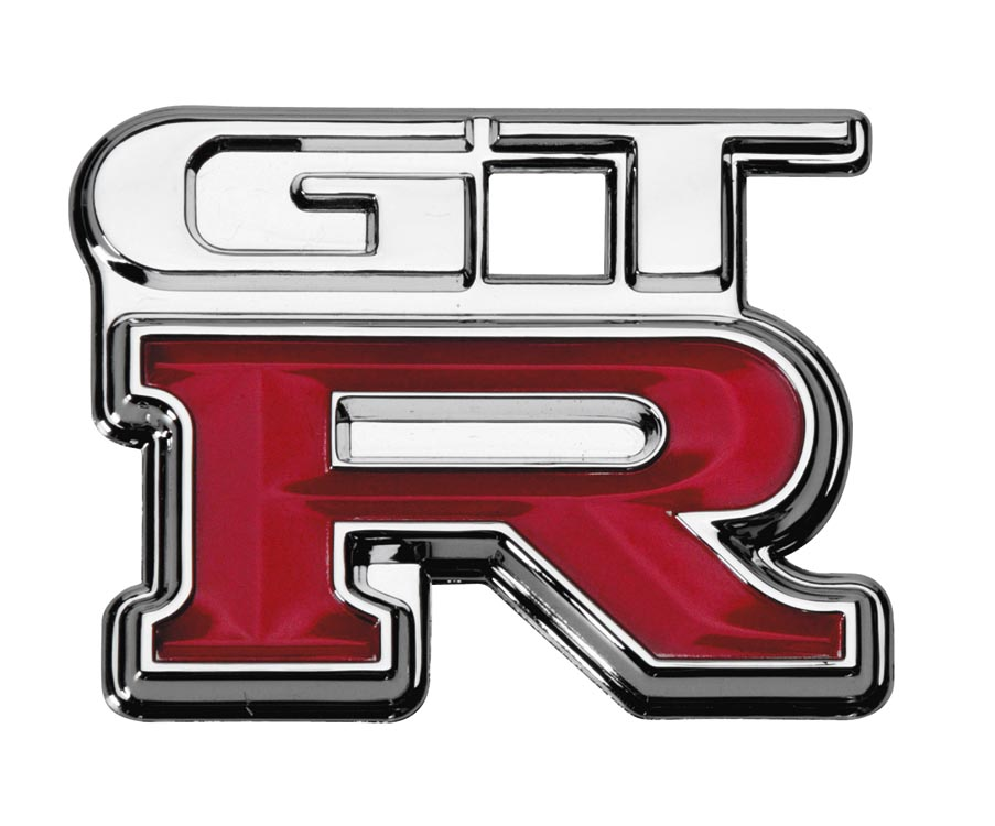 Nissan Skyline logo